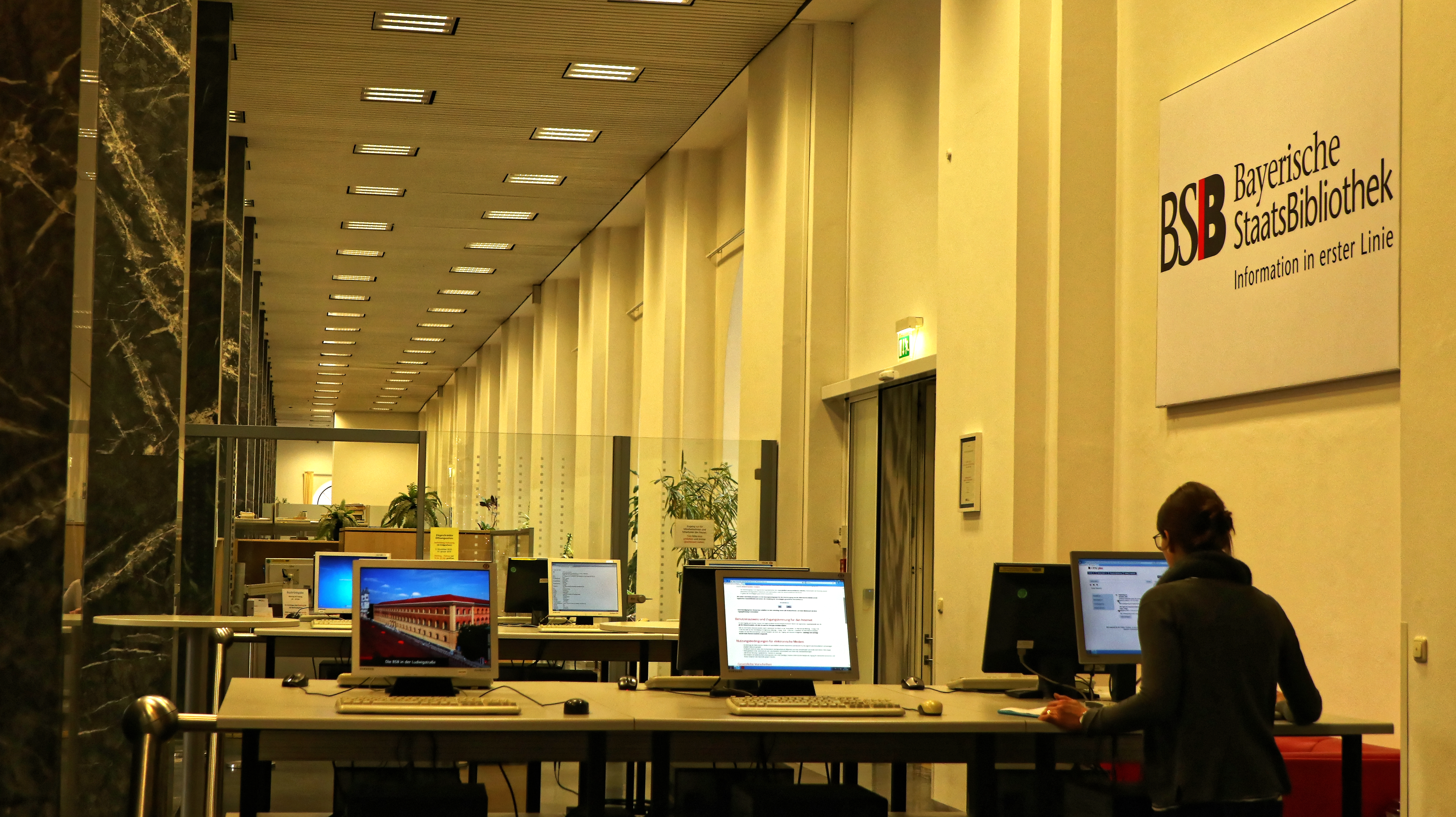 Tische mit PCs zum Recherchieren